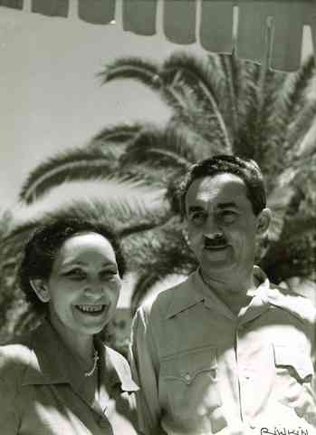 Moshe & Tzippora Sharett in Foreign Minister's Official Residence, Ramat Gan